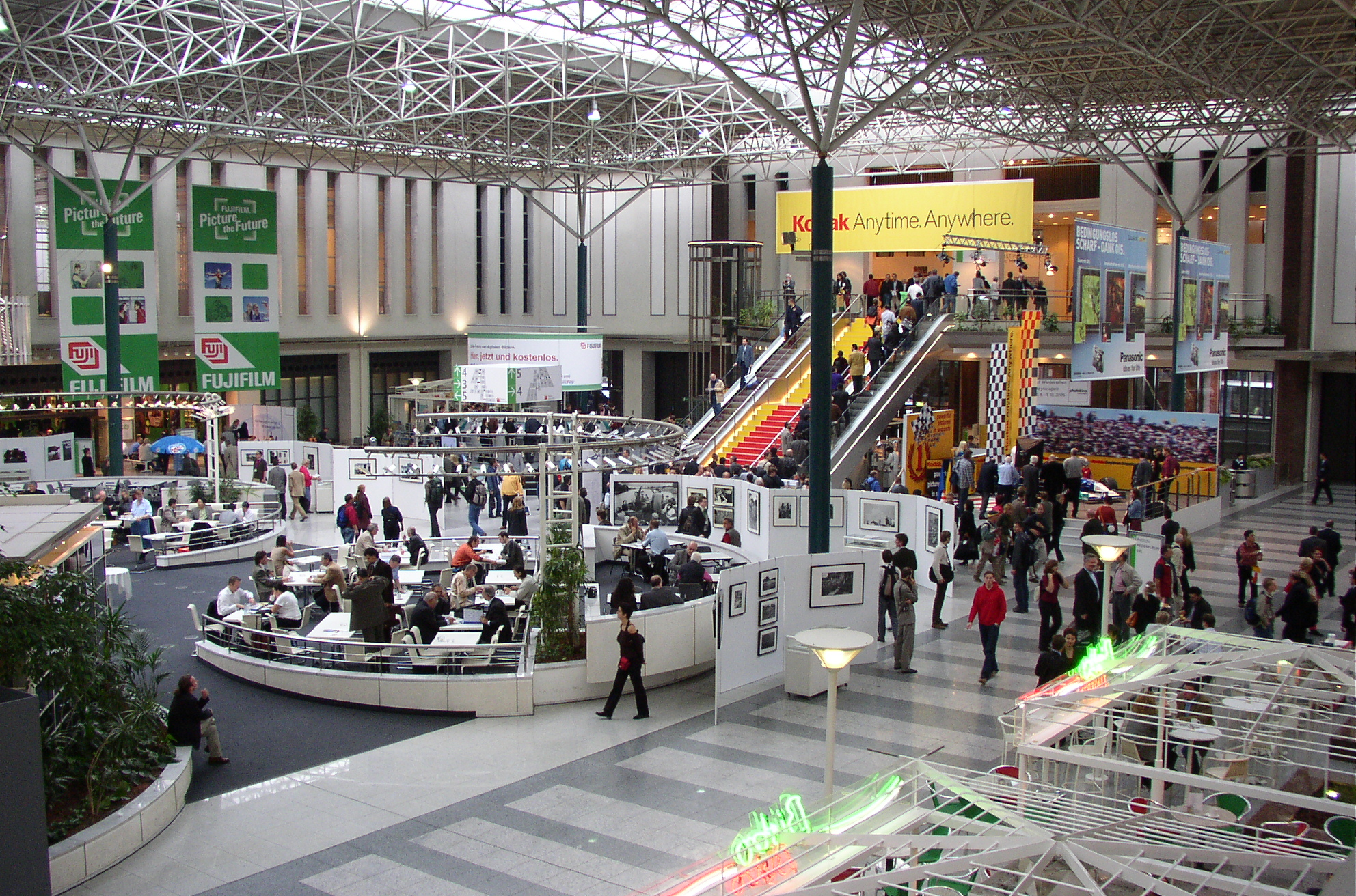 Zentrale Halle in den Kölner Messehallen